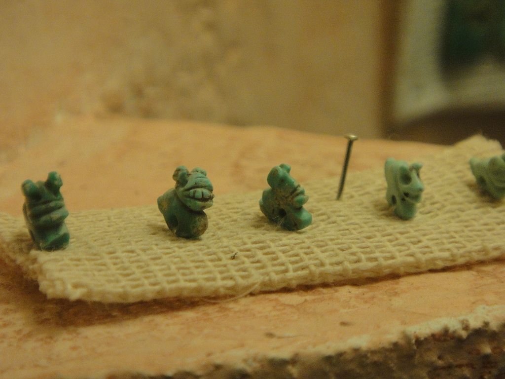 Template:Plazuelas turquoise jewelry miniatures